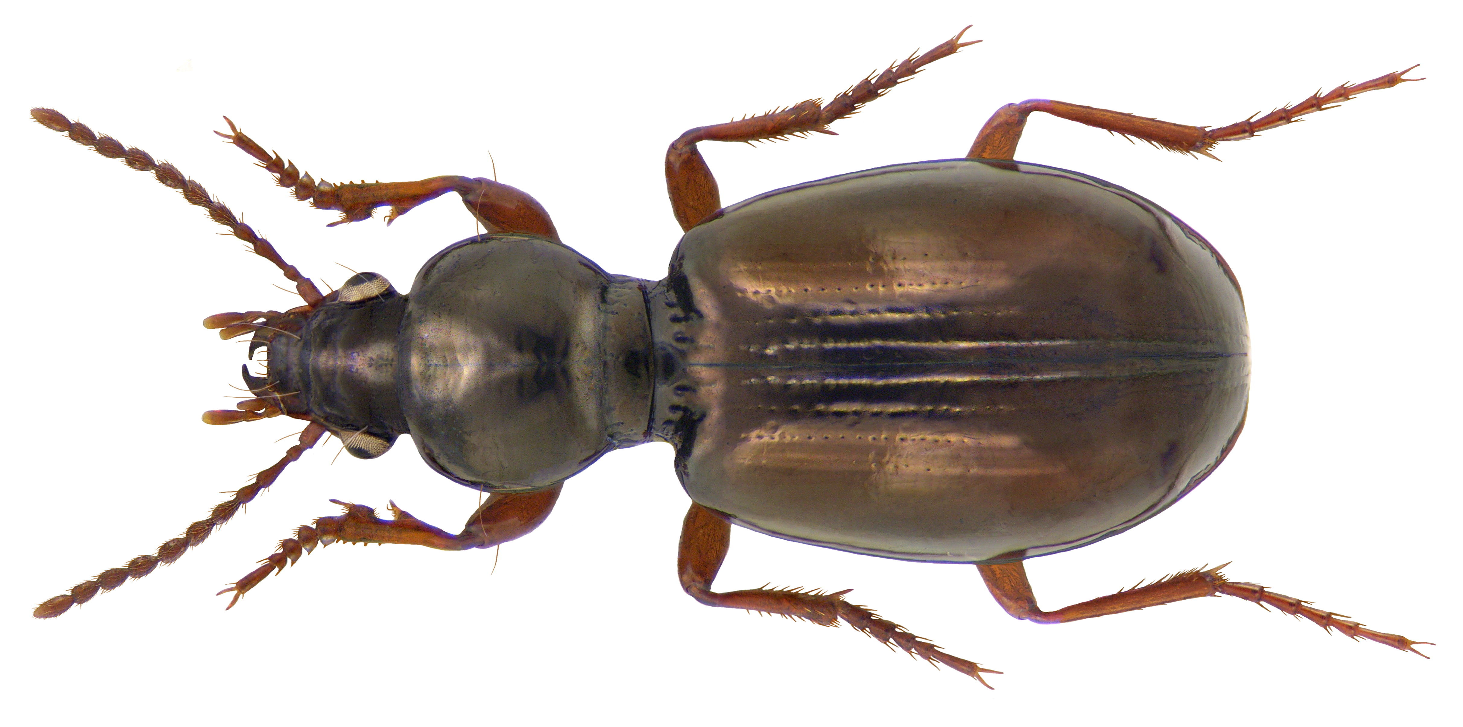 Familie: Carabidae Grösse: 6,3-8 mm Fundort: England, Dorback Bum leg.det. M.G.Telfer, 2004 Foto: U.Schmidt, 2009